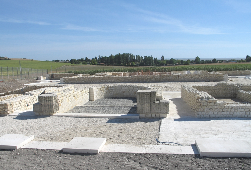 Site archéologique du Fâ (Barzan); thermes réhabilités